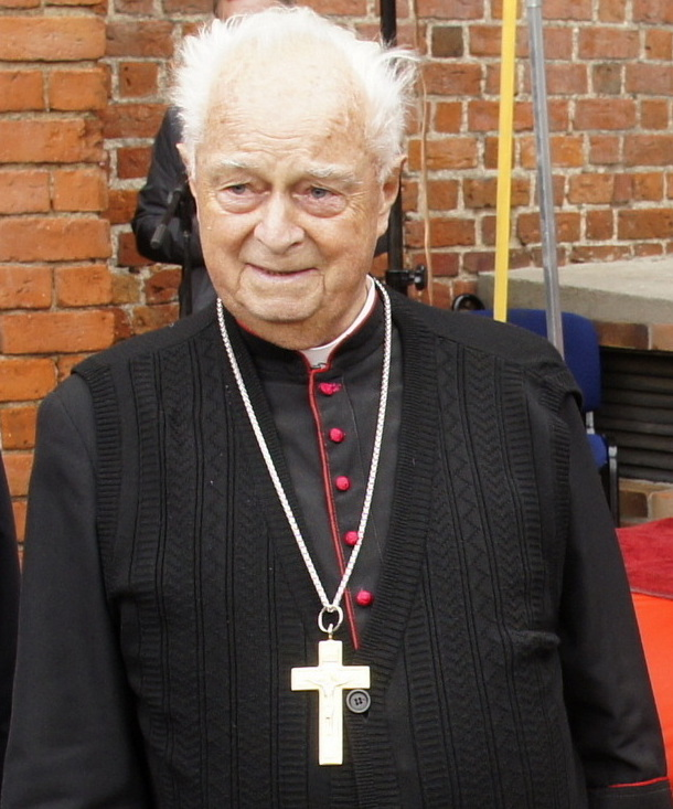 Gorzów Wlkp. Stary Rynek, pomnik prałata Witolda Andrzejewskiego. Uroczystość odsłonięcia, na fotografii bp senior Adam Dyczkowski.